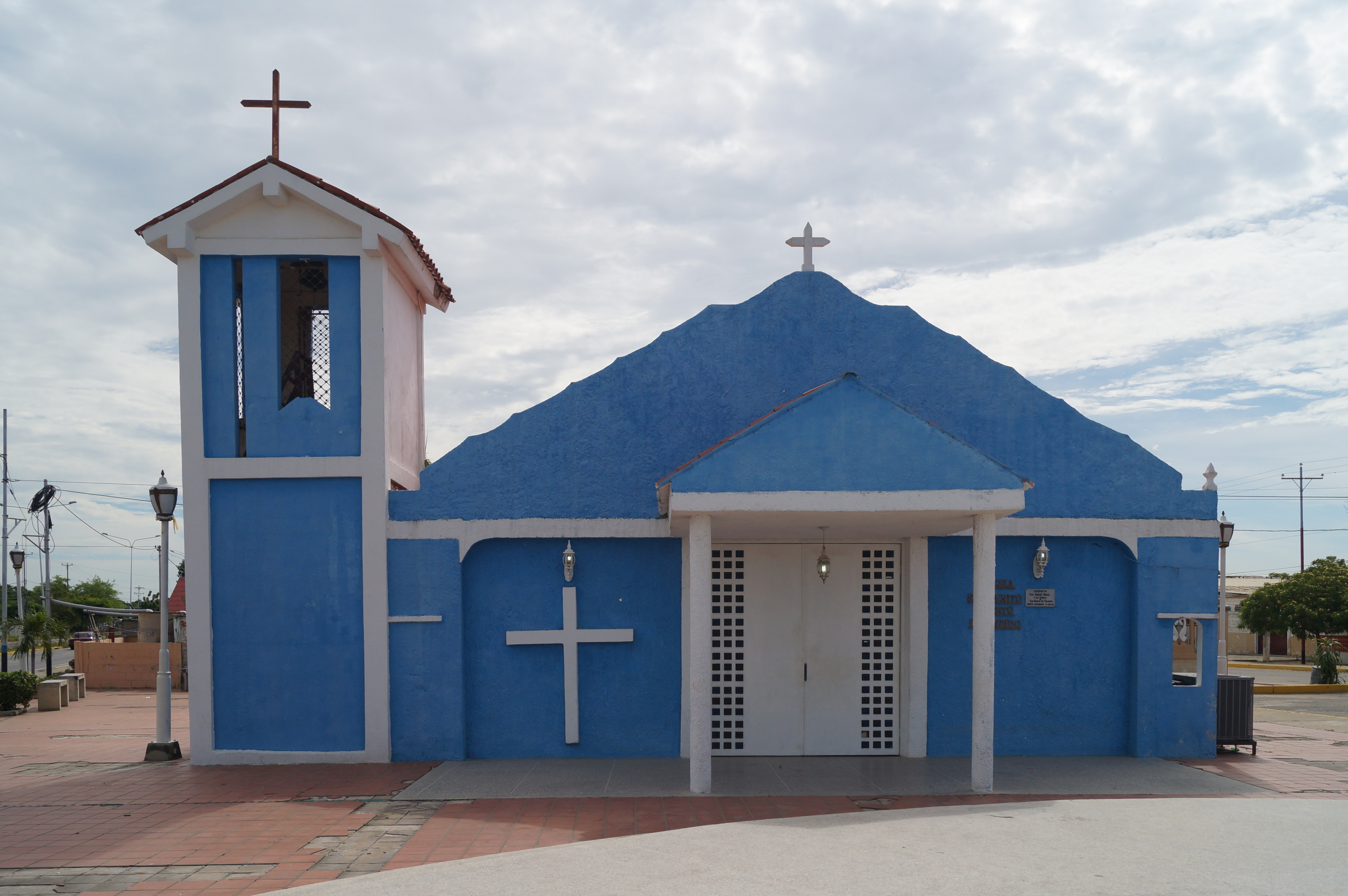 Iglesia San Benito de Palermo. Ubicada en el municipio Santa Rita, Av Pedro Lucas Urribarrí. Puerto Escondido. Estado Zulia